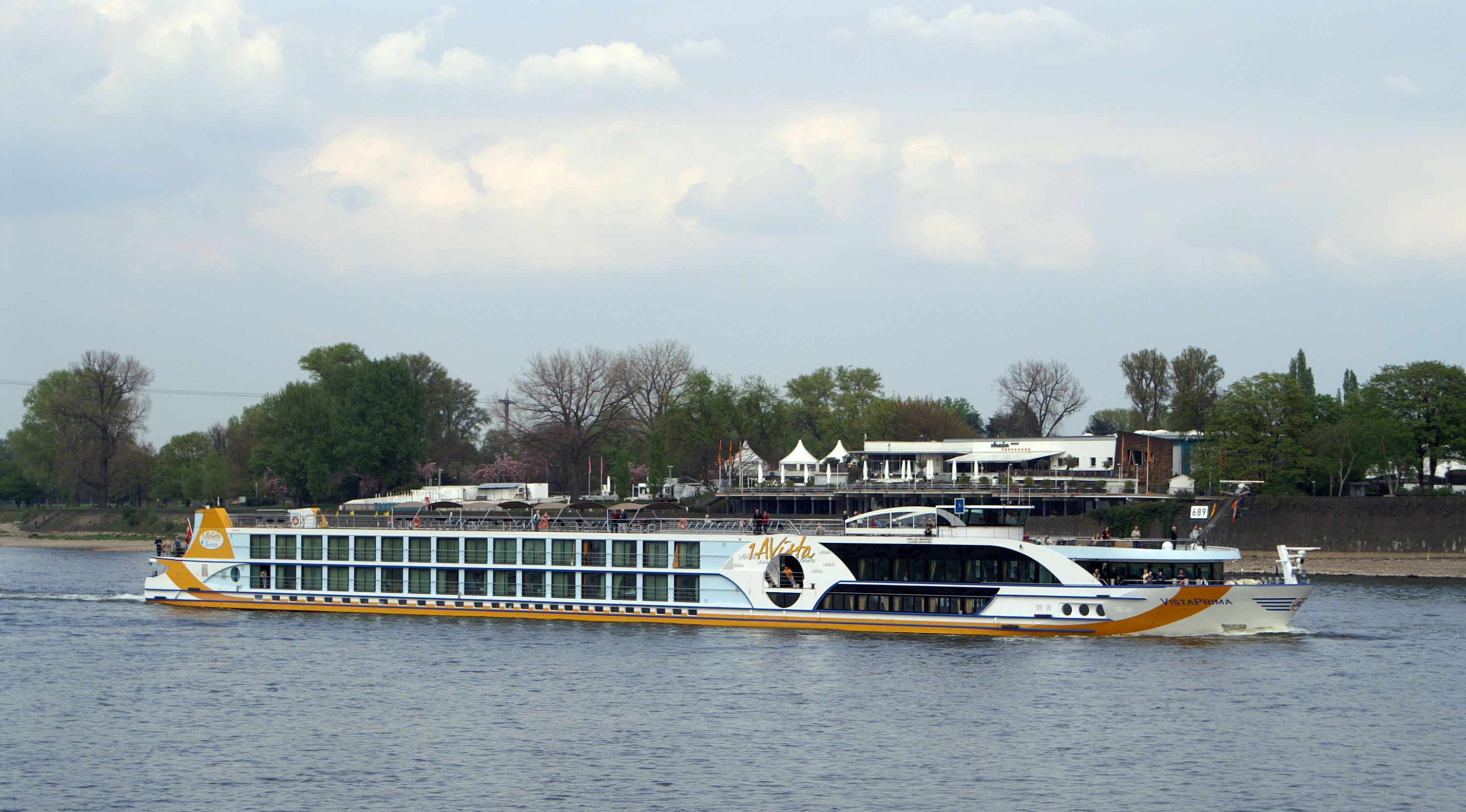 Flusskreuzfahrtschiff Vista Prima auf Fahrt in Köln.